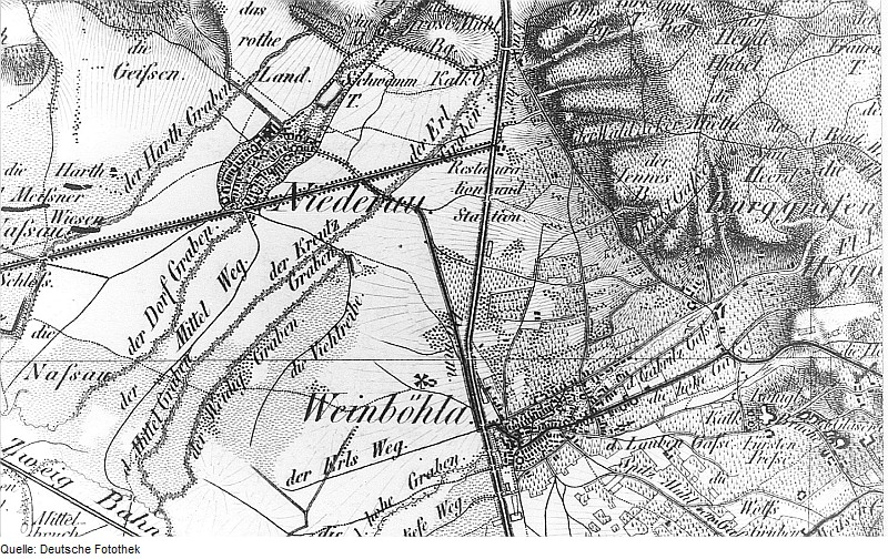 Original image description from the Deutsche Fotothek Weinböhla. Oberreit, Sect. Großenhain, 1841/43